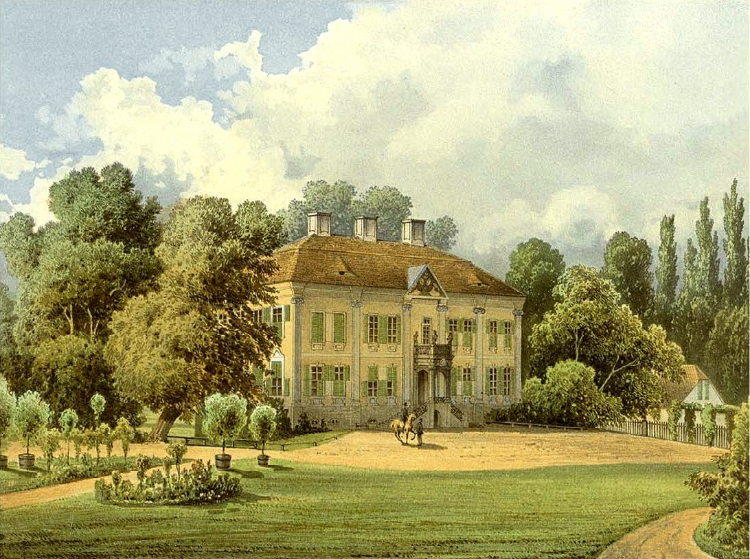 Gut Stülpe, Kreis Jüterbog-Luckenwalde, Provinz Brandenburg